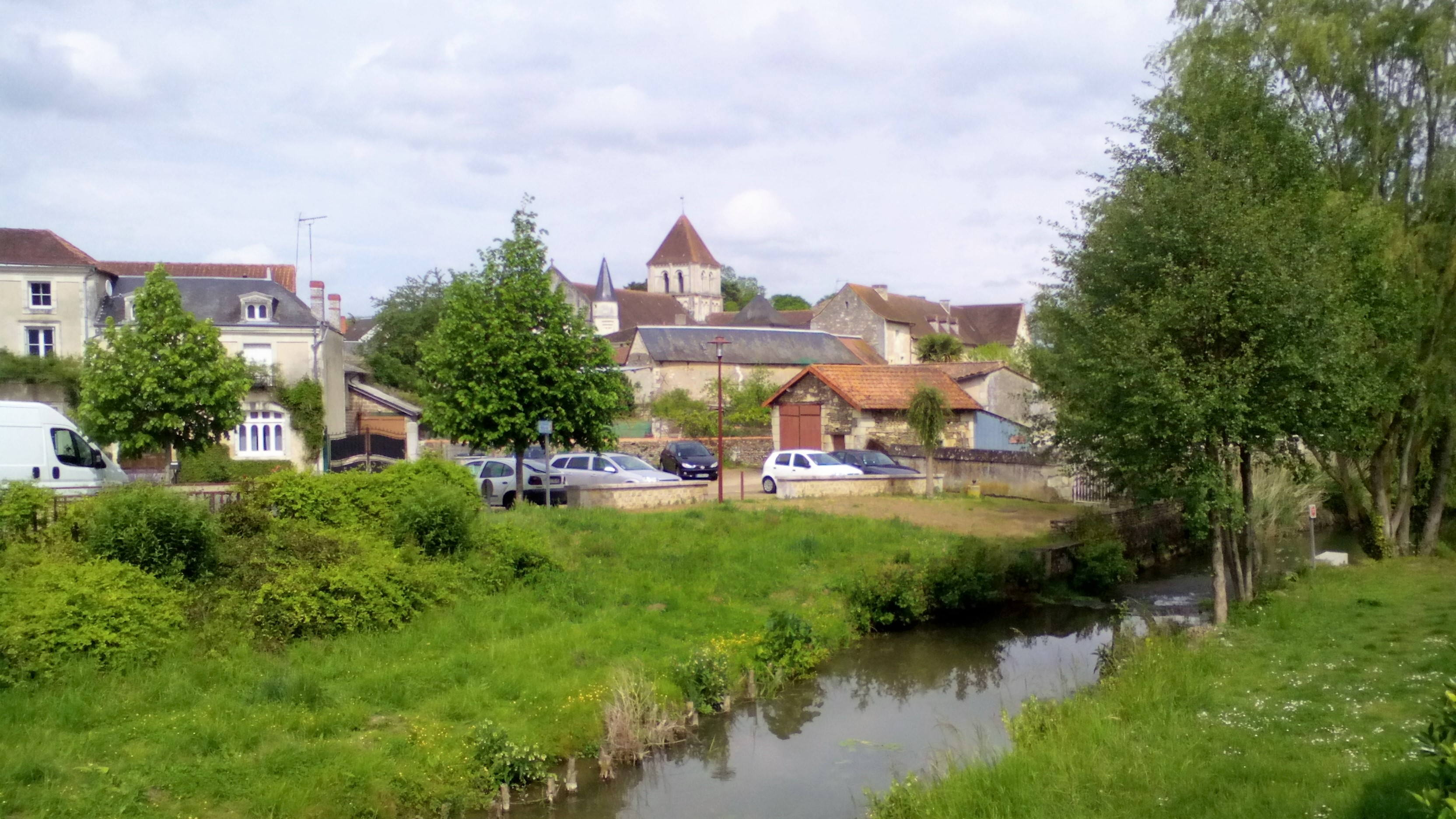 L'Envigne cours d'eau passant à Lencloître (86140, France)